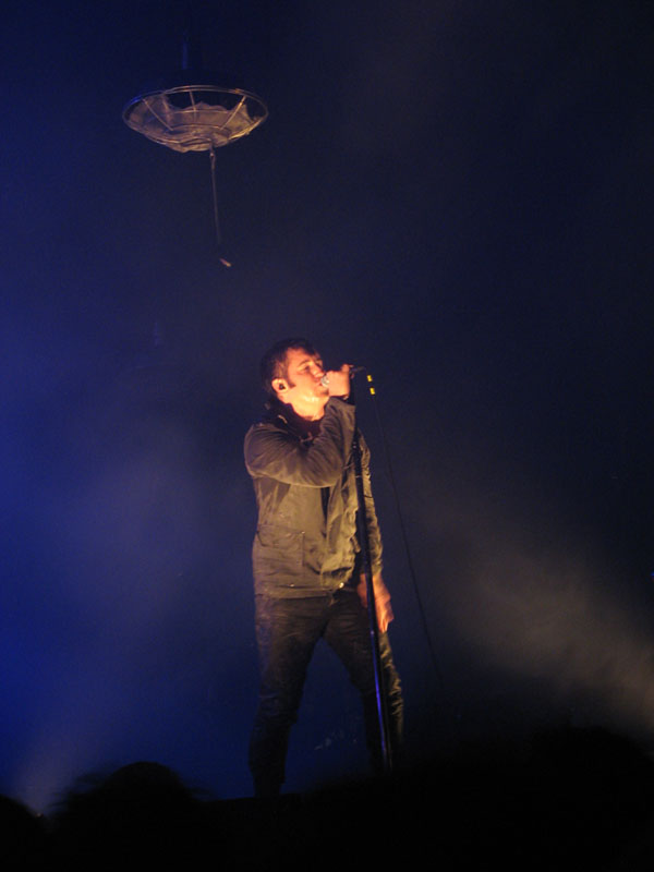 Trent Reznor, frontman a jediný stálý člen kapely Nine Inch Nails na vystoupení v Mnichově.